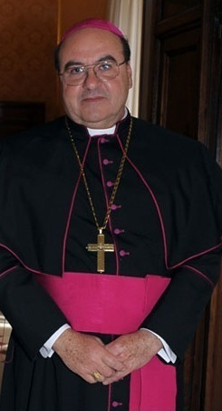 S.E.R. Mons. Marcelo Raúl Martorell